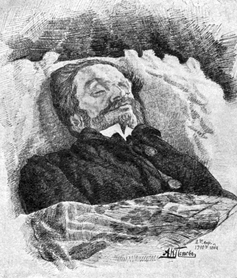 Врубель в гробу. Последний портрет Врубеля. Сделан с натуры учеником академии художеств А.Н. Поповым, во время прощания с ним в церкви при академии 2 апреля 1911 года (по ст. стилю).